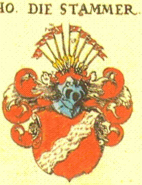 Wappen der Familie von Stammer